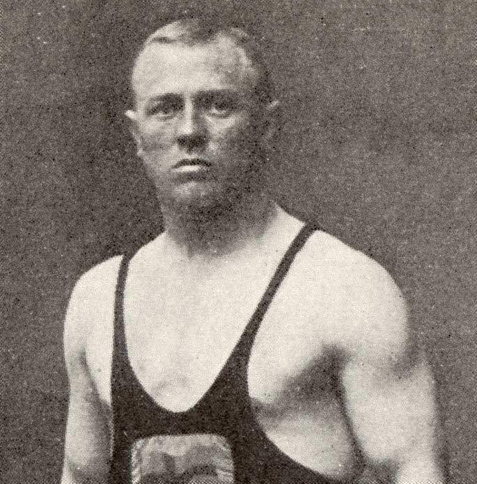 Calle Westergren